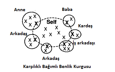 karşılıklı bağımlı benlik kurgusu